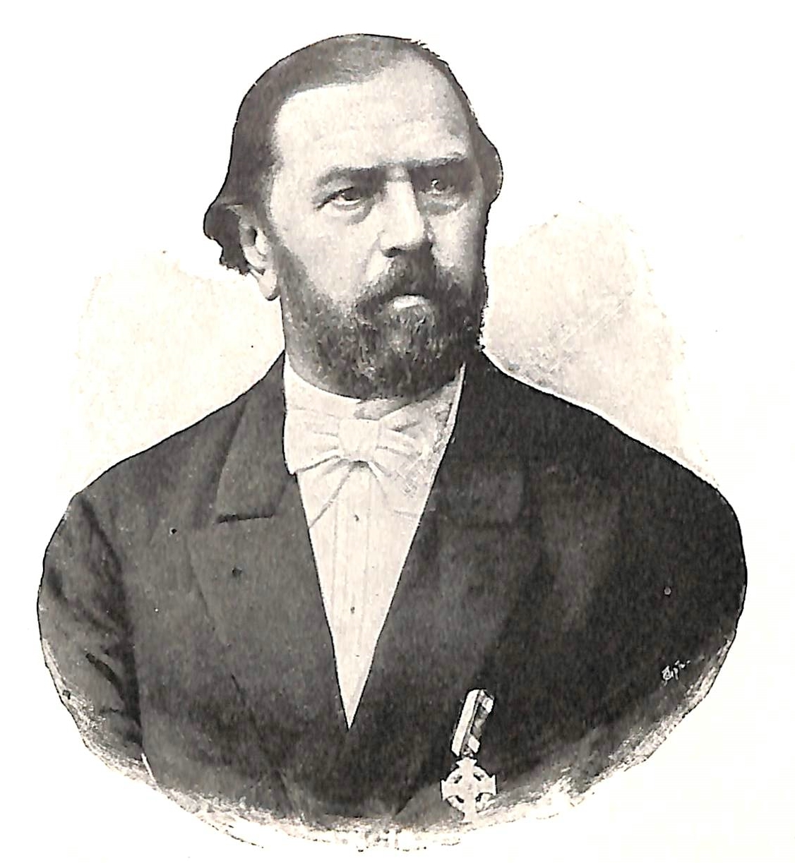 Portrait des Sächsischen Ingenieurs und Fabrikant Christian Rudolf Sack. Er war Begründer der Leipziger Fabrik für Ackerbau-Geräte und Maschinen mit etwa 500 Mitarbeitern im Stammwerk Leipzig-Plagwiz. Hauptprodukt war der von Sack optimierte Universalpflug - hergestellt in einer Dauerserie mit 2.000.000 Exemplaren.